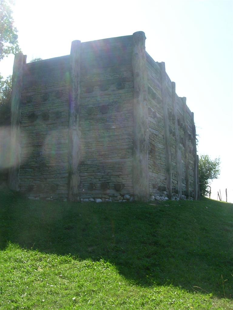 Fortification Helvète du Mont Vully, FR, Switzerland